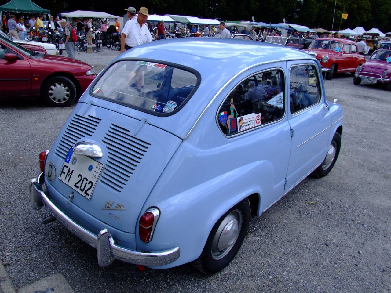 Quelle: selbst fotografiert, 07/2006 Fotograf: Späth Chr.